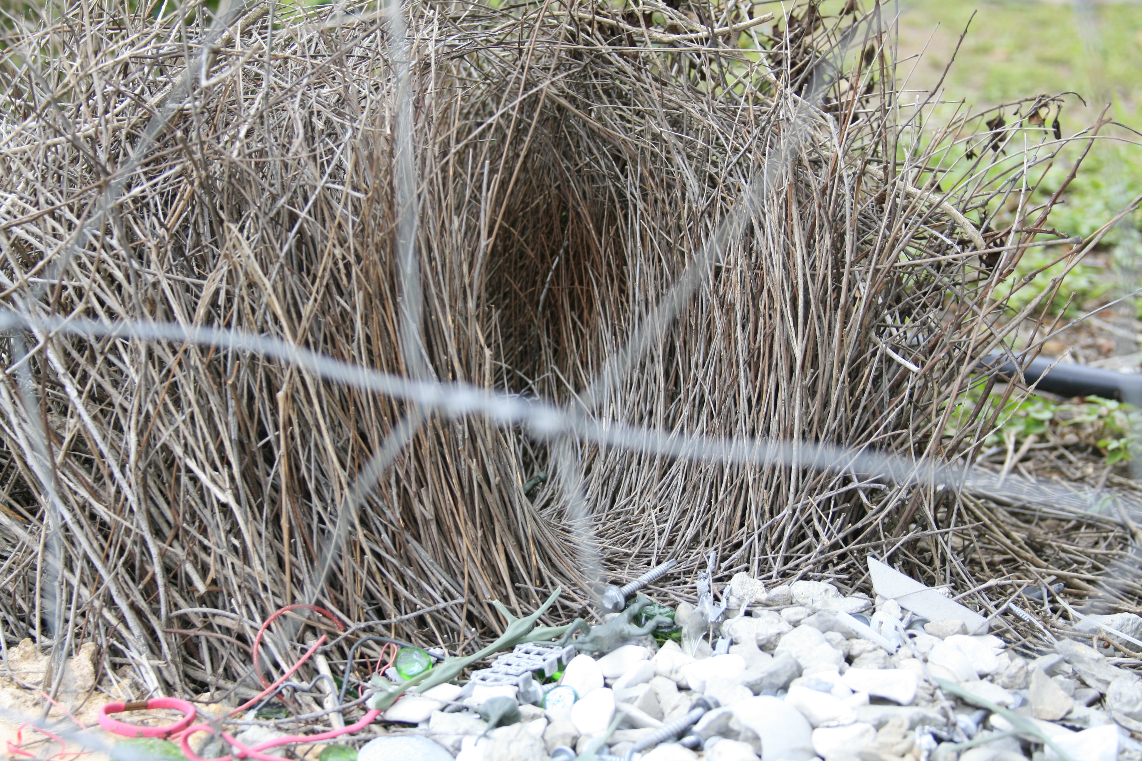 Bower Bird Nest